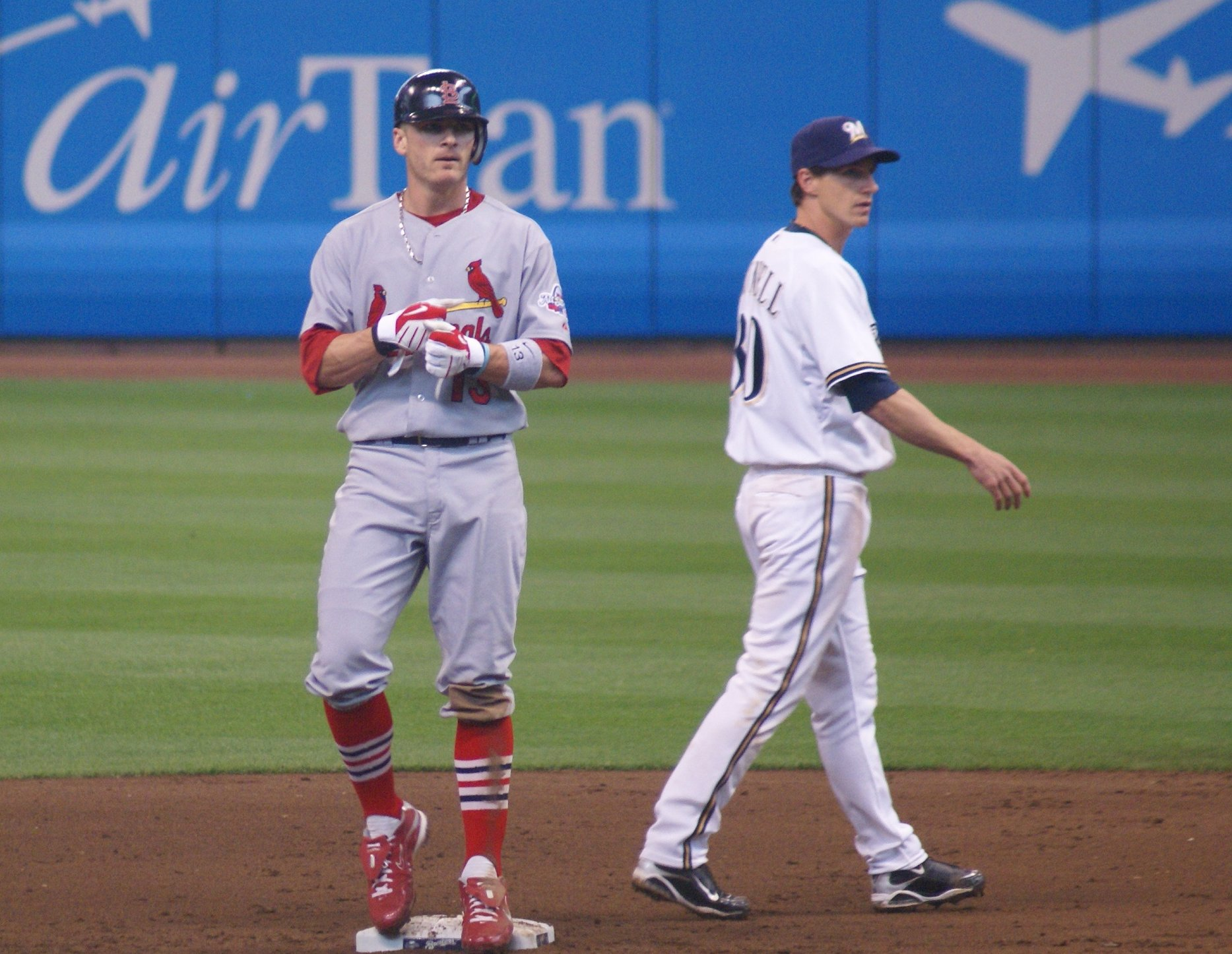 Brendan Ryan (left) and Craig Counsell